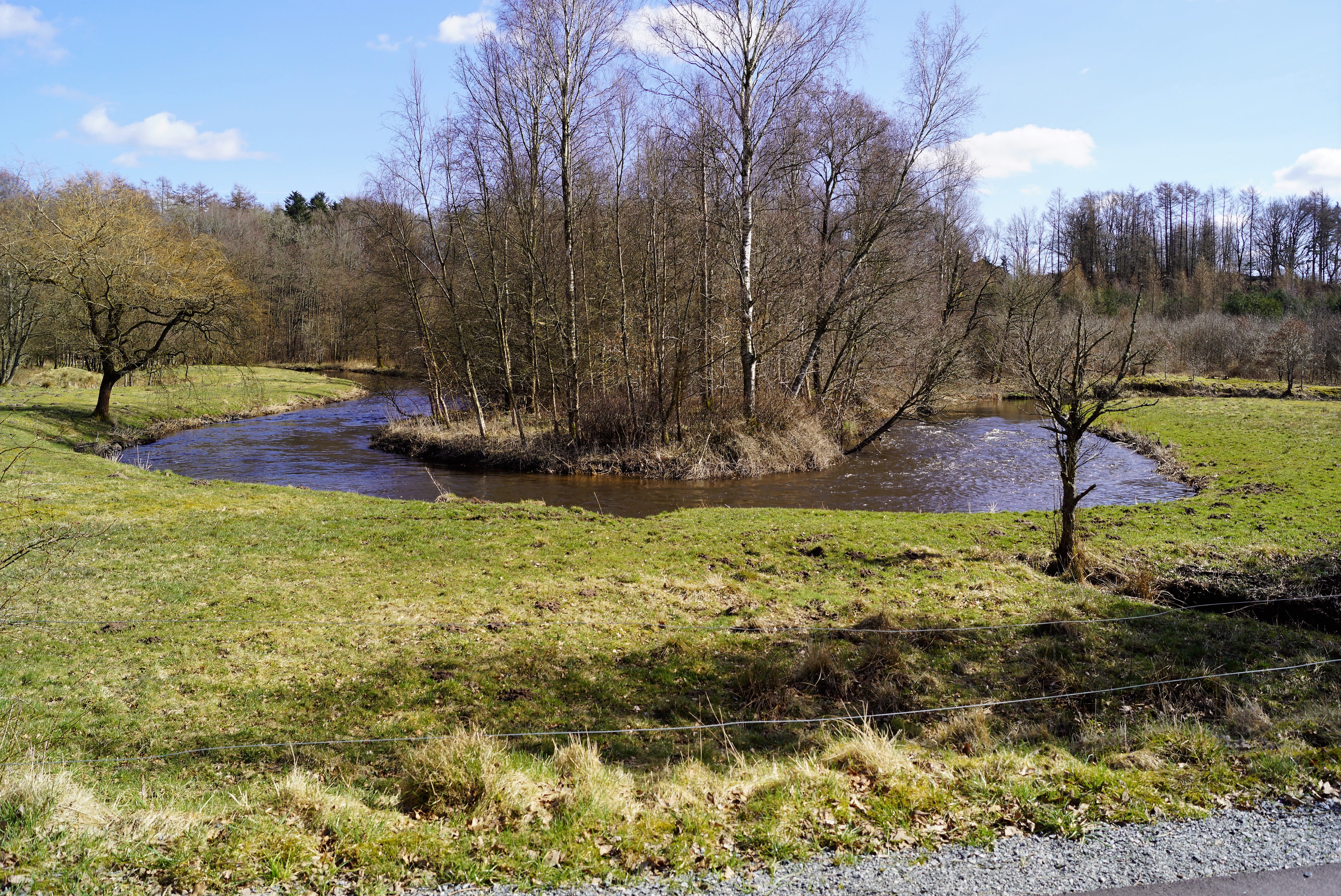 meandersving ved Vejle Å nordøst for Vingsted